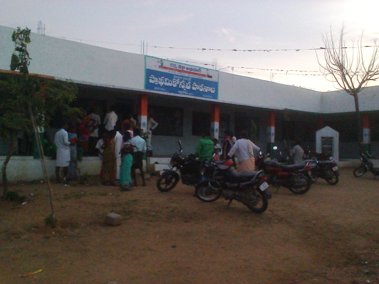 ప్రాథమికోన్నత పాఠశాల, గార్లపాడు